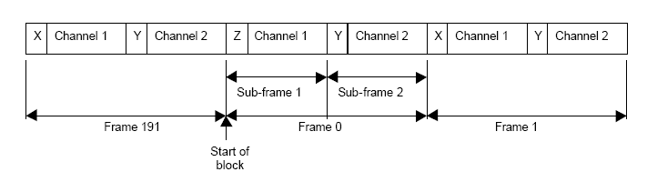 Estructuració dels frames als corrents de dades del protocol AES/EBU